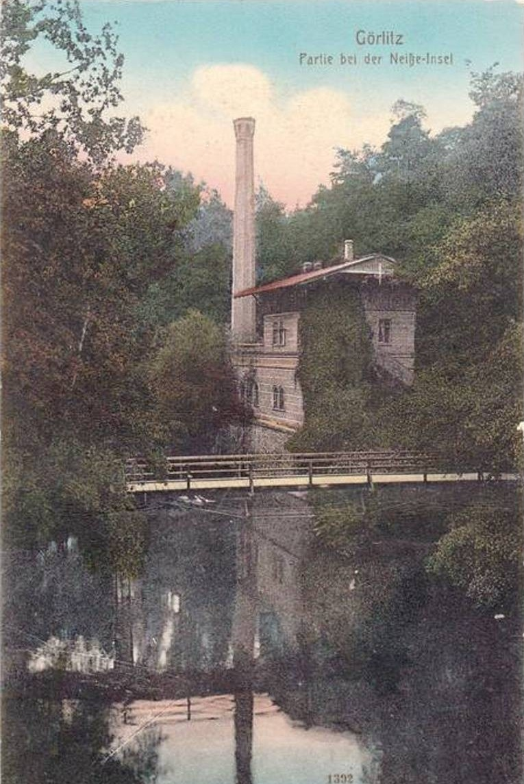 Alte Wasserpumstation (Lokomobile) an der Lausitzer Neiße in Görlitz